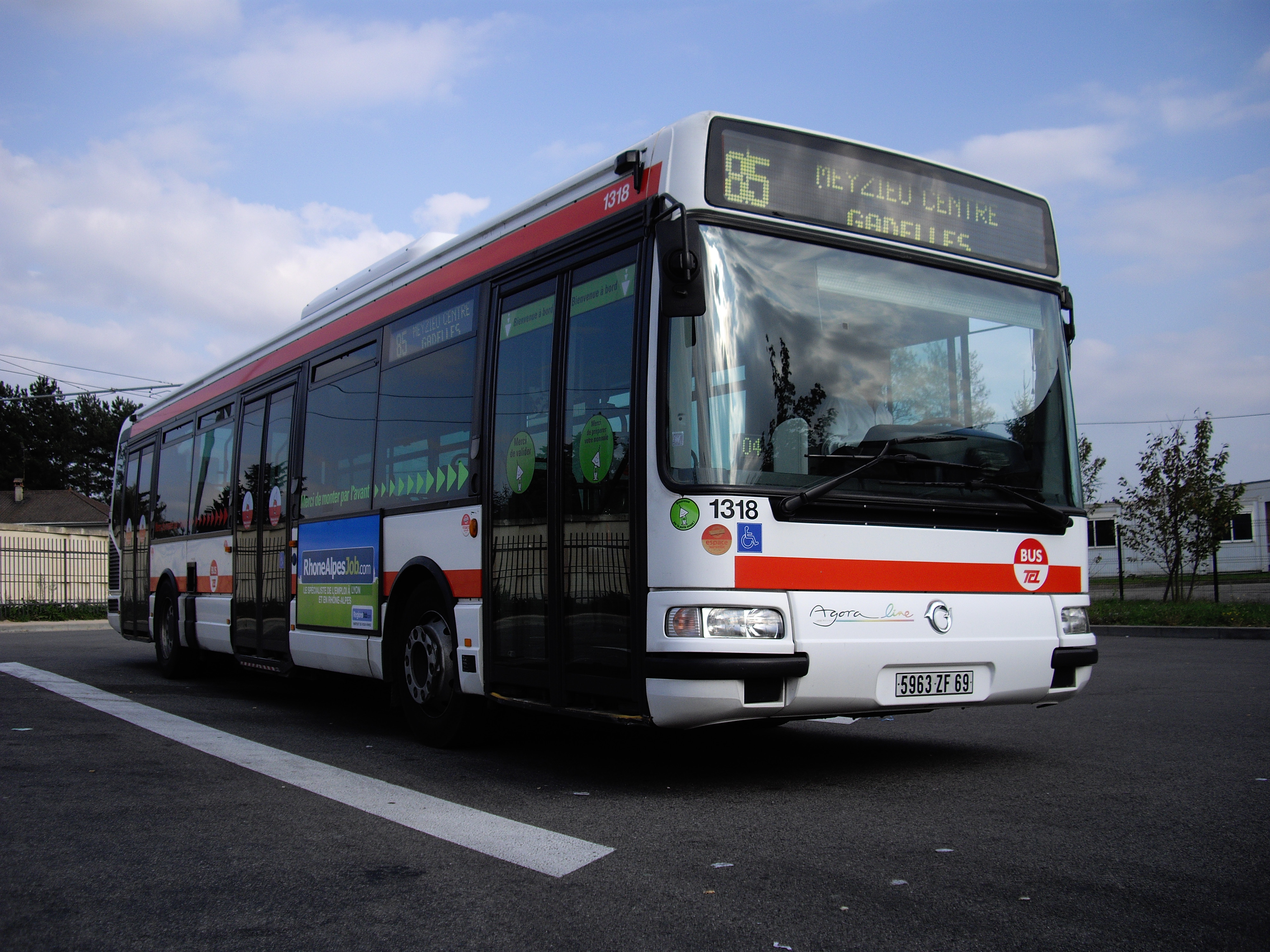 1318 de la ligne 85 à son terminus, Décines Grand Large, en Septembre 2008